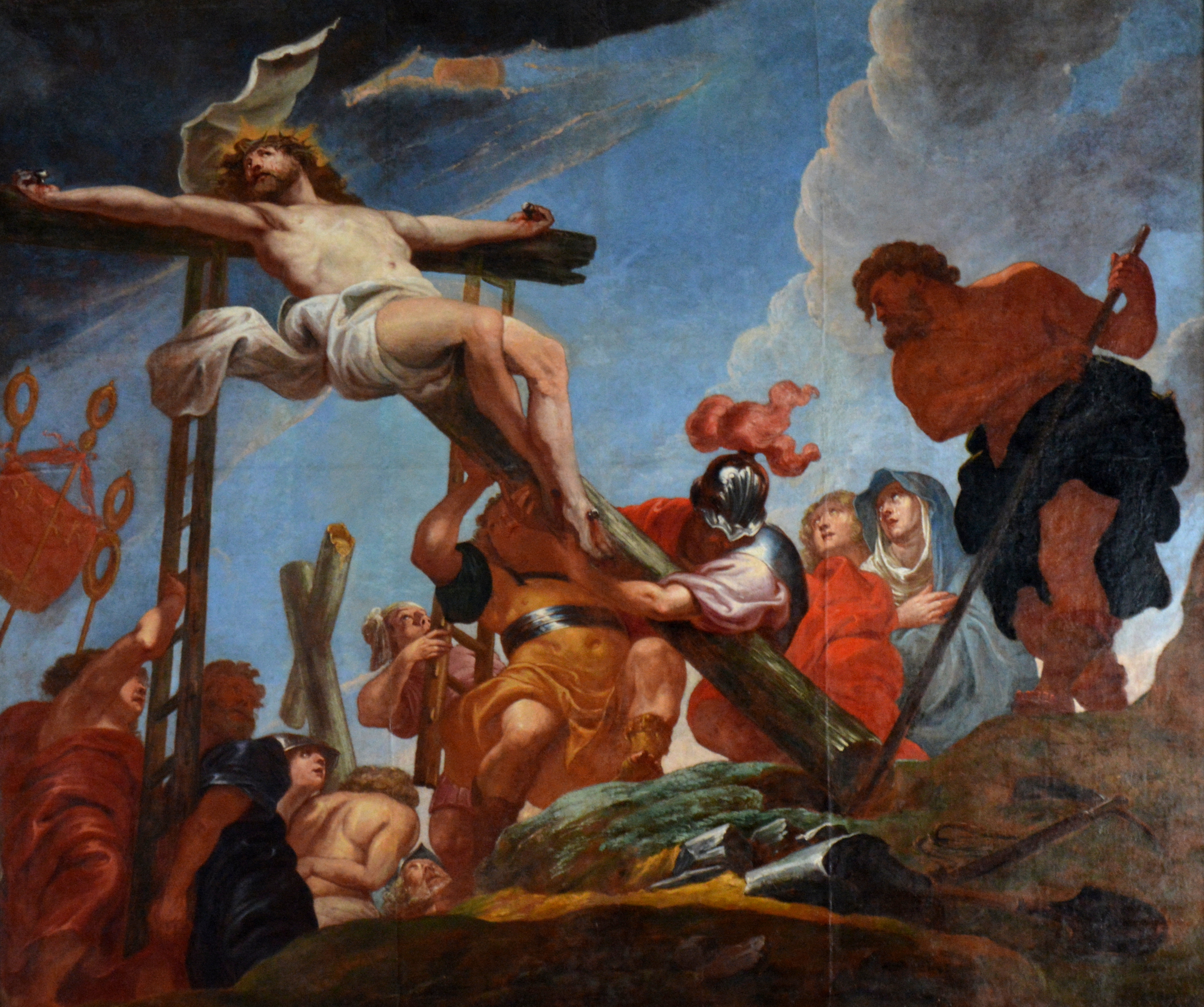 Idstein, Unionskirche. Kreuzaufrichtung.